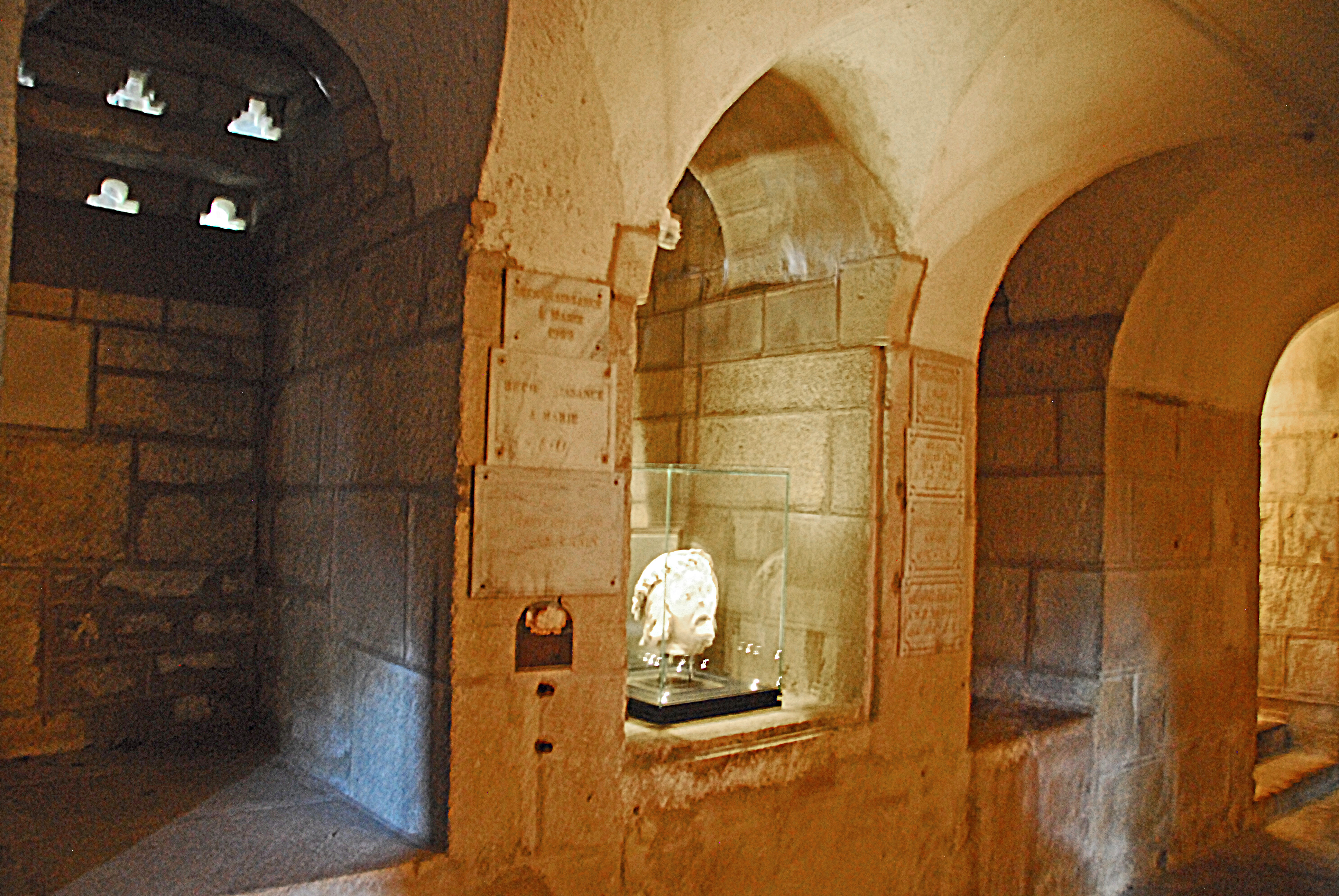 St-Saturnin (Puy-de-Dôme), Krypta, Martyrion